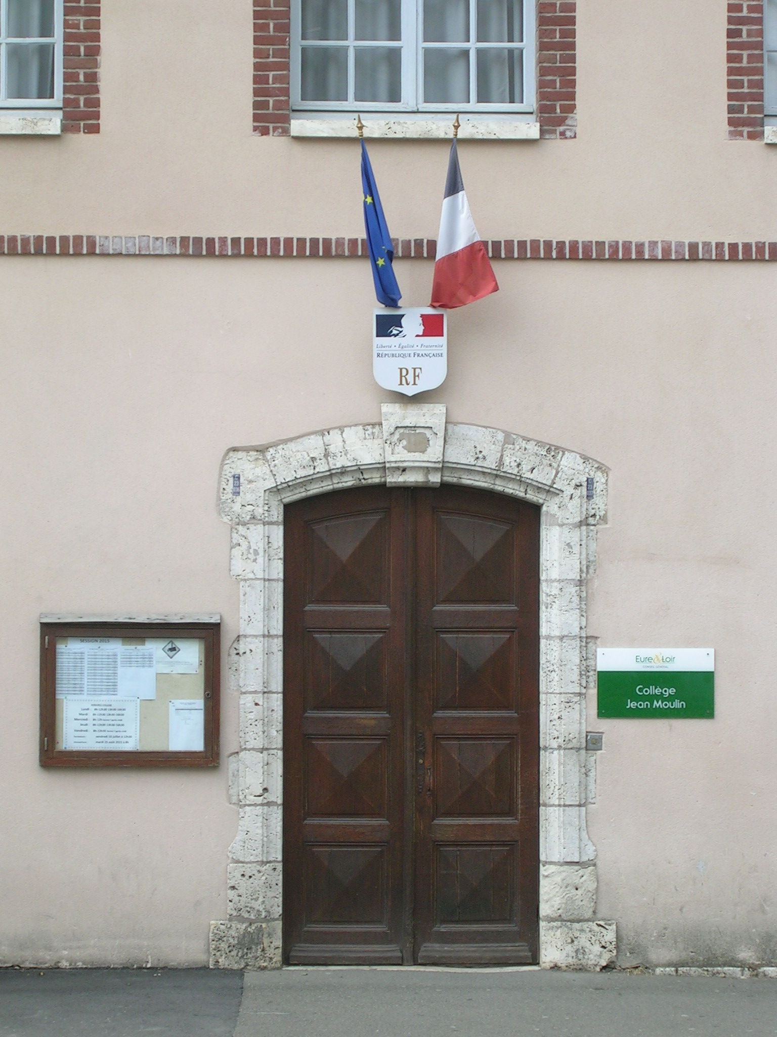 Collège Jean Moulin (12, rue Sainte Même, Chartres).